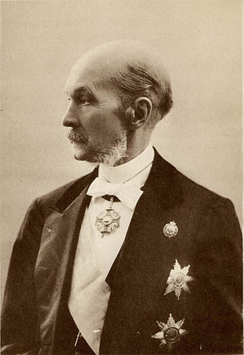 Набоков, Дмитрий Николаевич